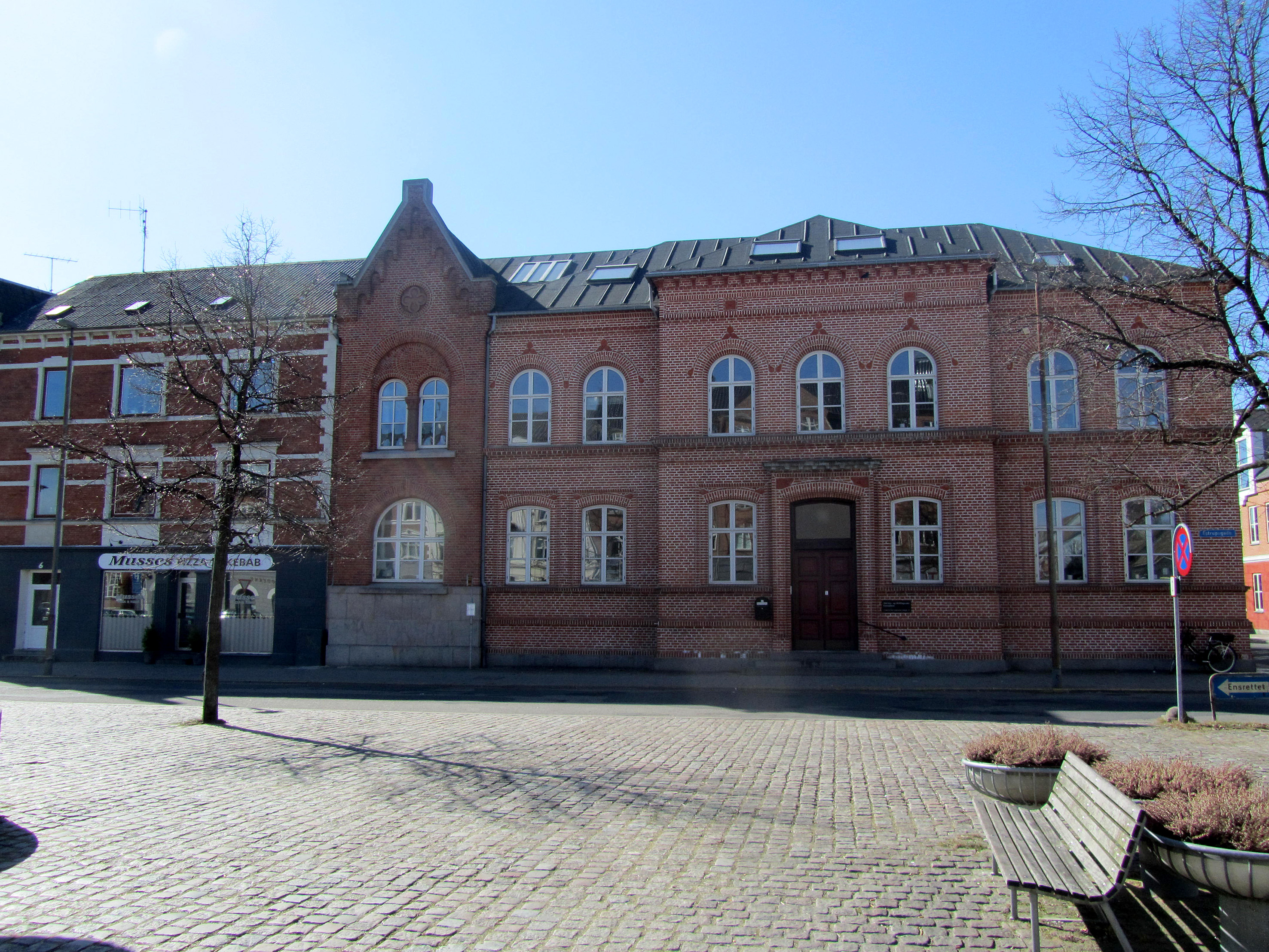 Tidligere Teknisk Skole på Skoletorvet i Silkeborg